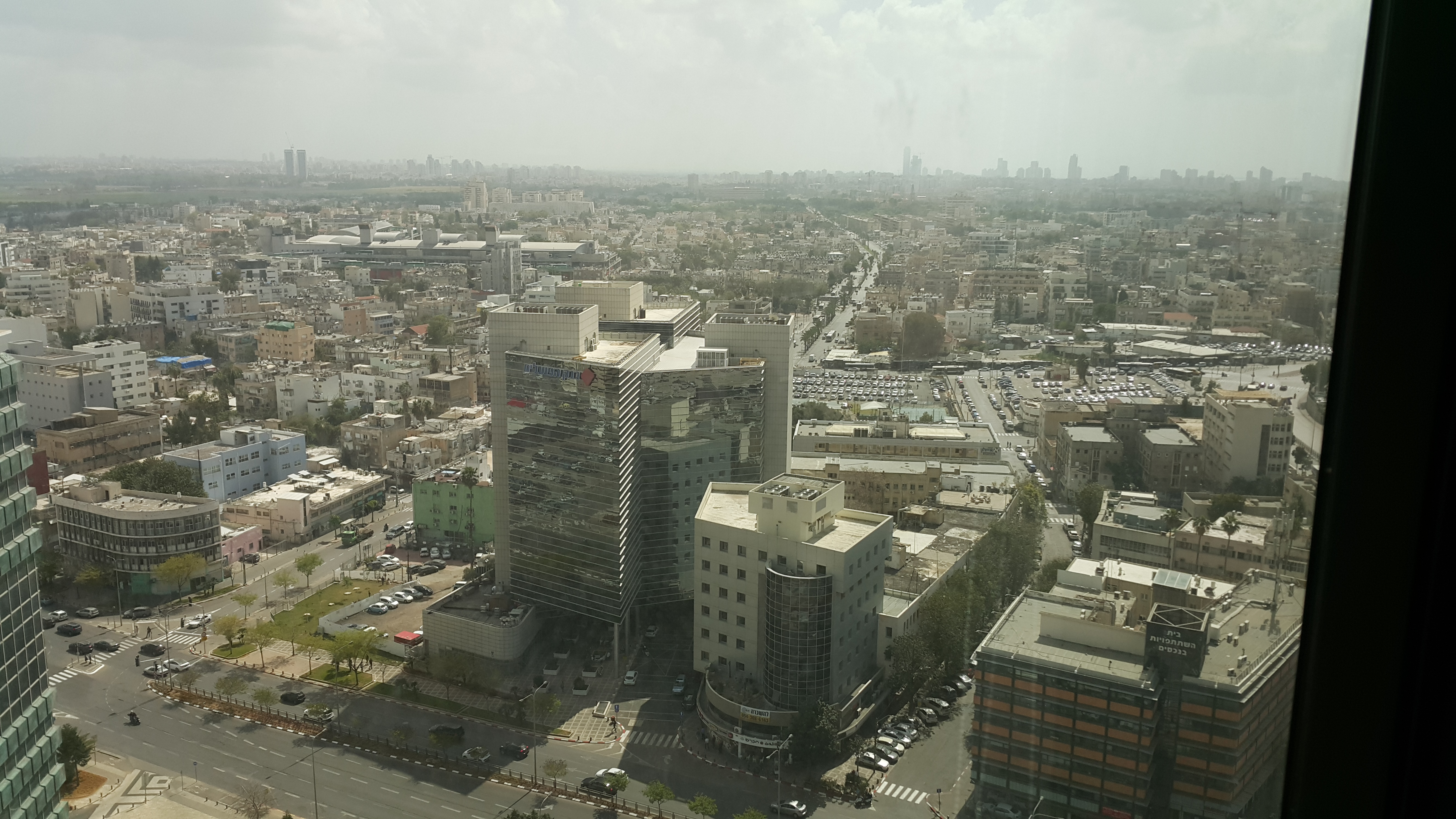 שכונת נווה שאנן וקרית המלאכה בצילום ממגדל לוינשטיין